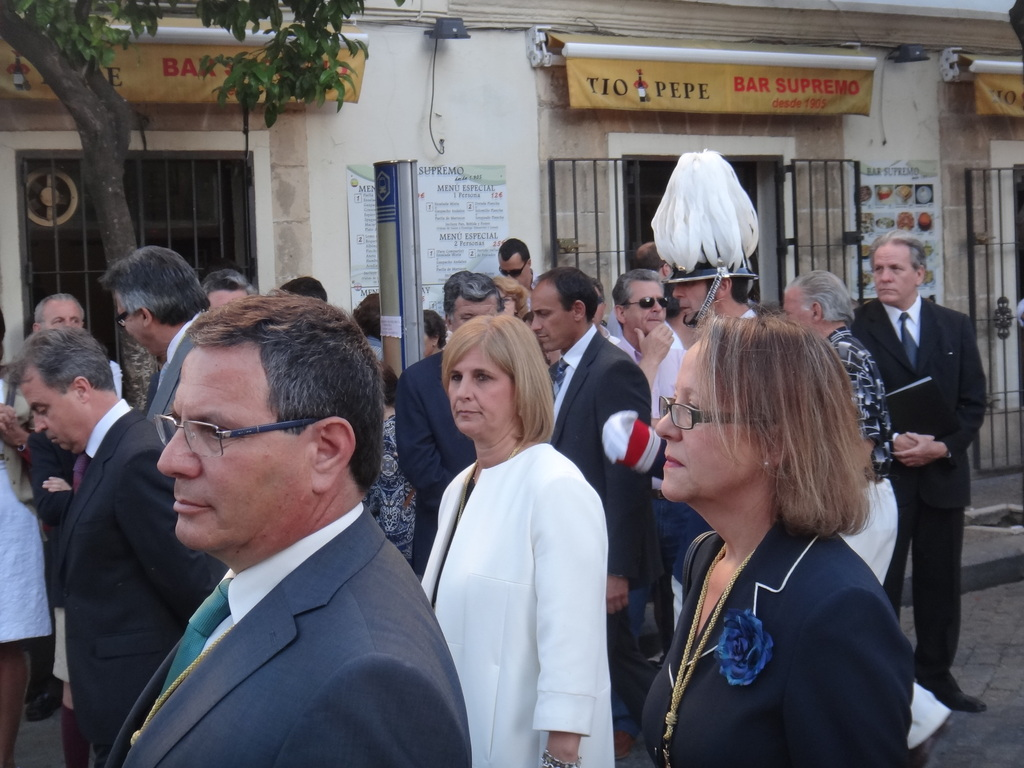 Procesión del Corpus Christi en Jerez de la Frontera (Andalucía, España). Alcaldesa Mª José García-Pelayo